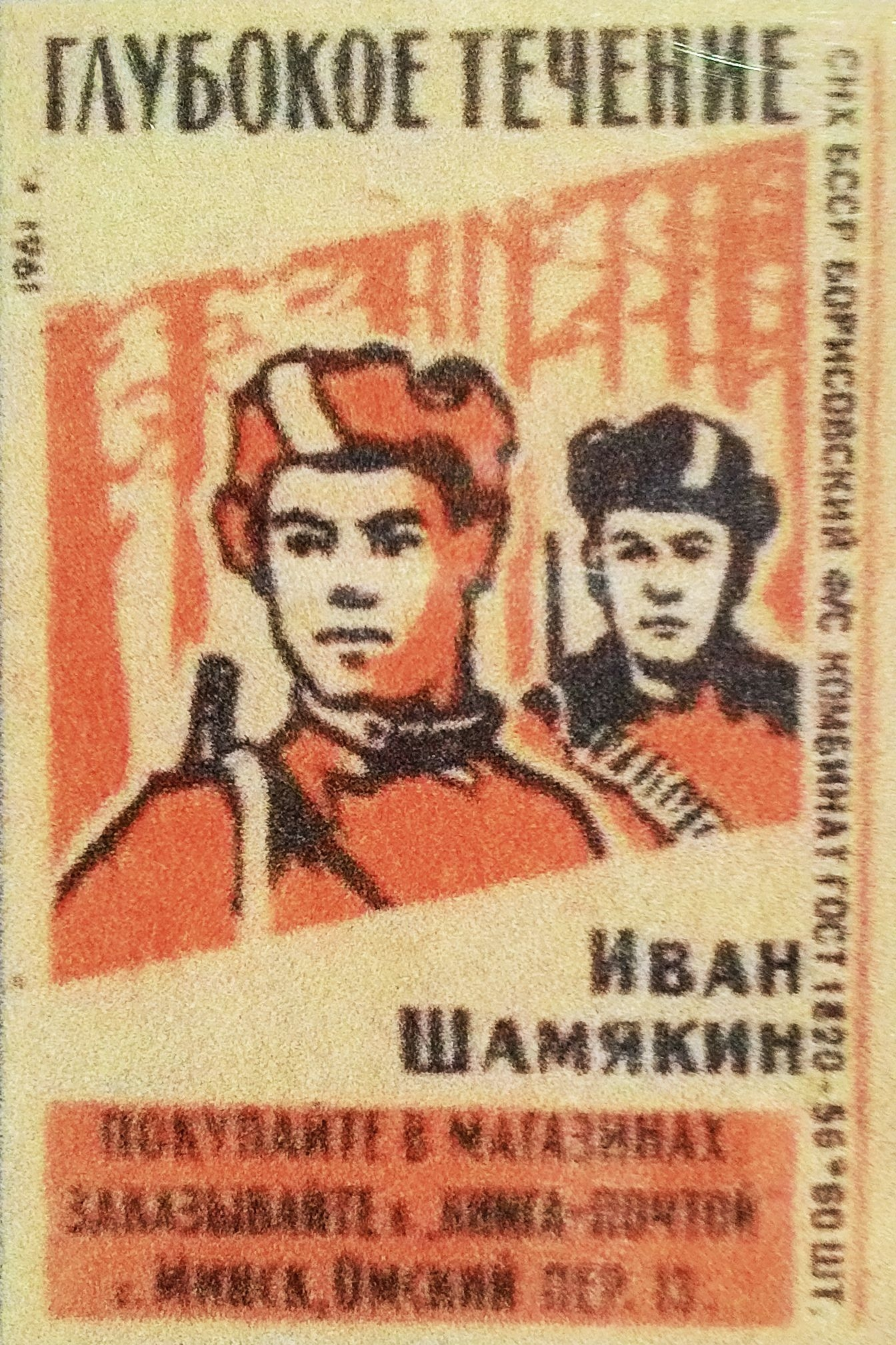 Спичечная этикетка с иллюстрацией к роману Ивана Шамякина "Глубокое течение"